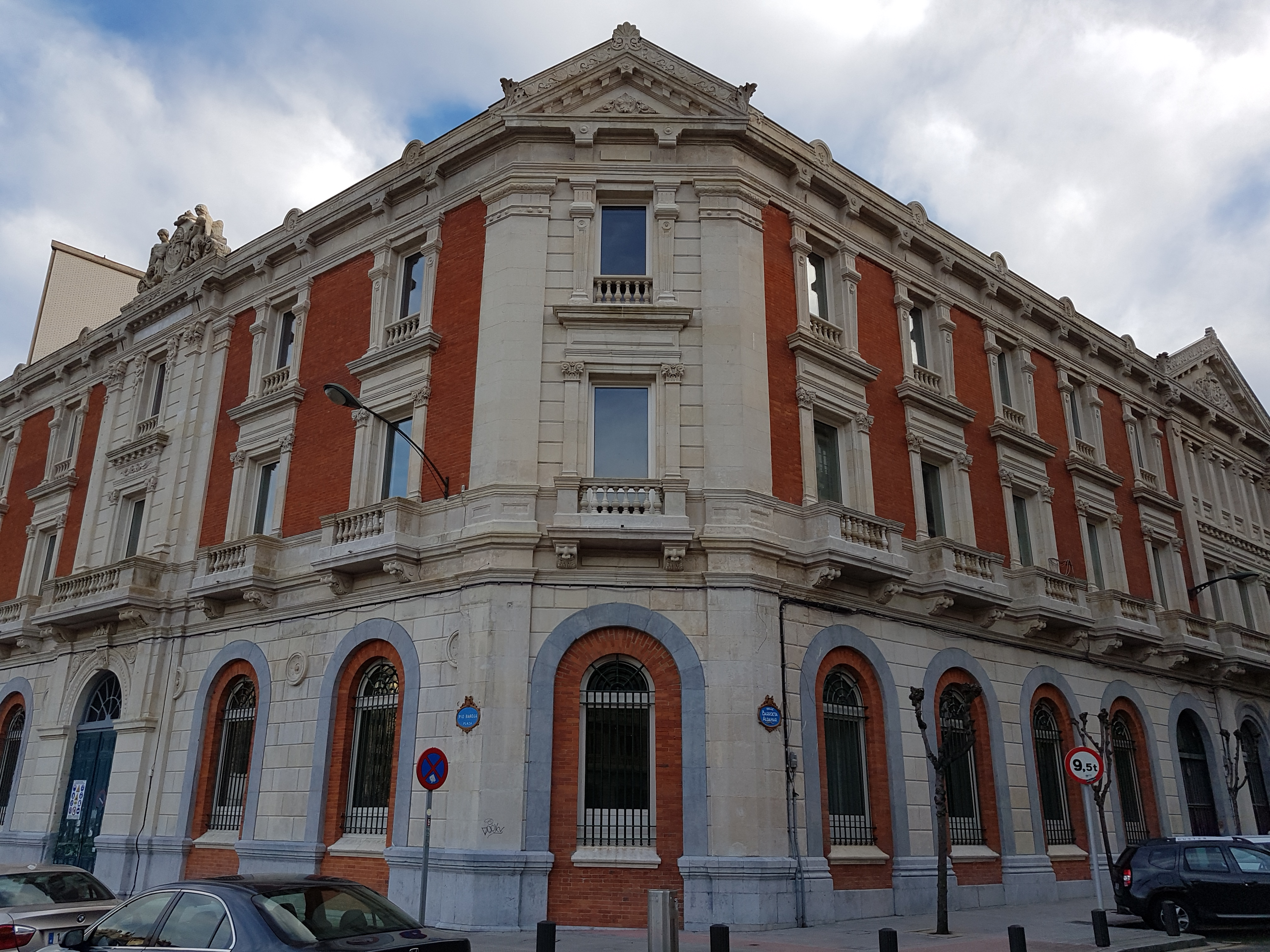 Edificio de la antigua Aduana de Bilbao, enero 2018.